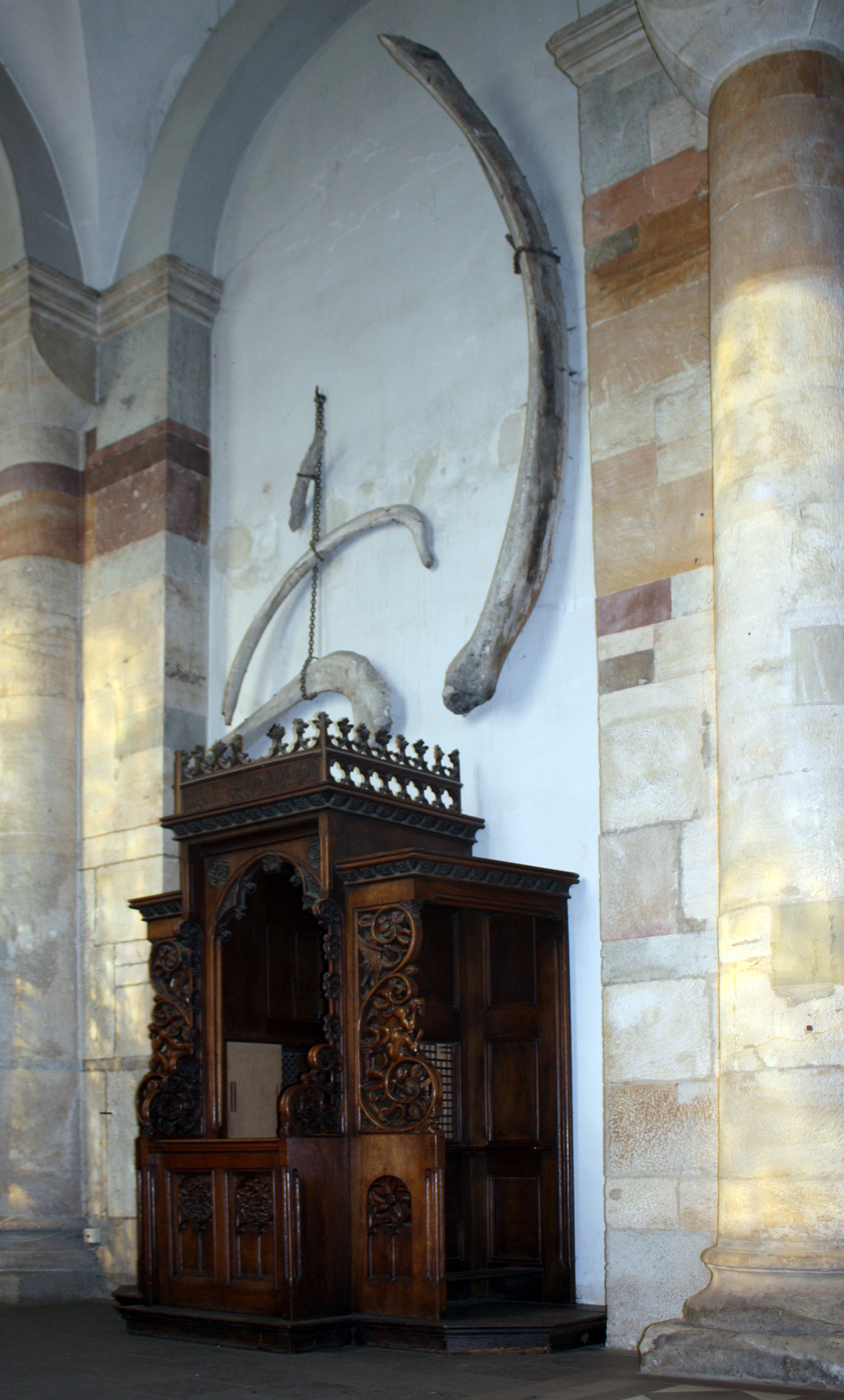 St. Maria im Kapitol, Köln. Altes Beichtgestühl